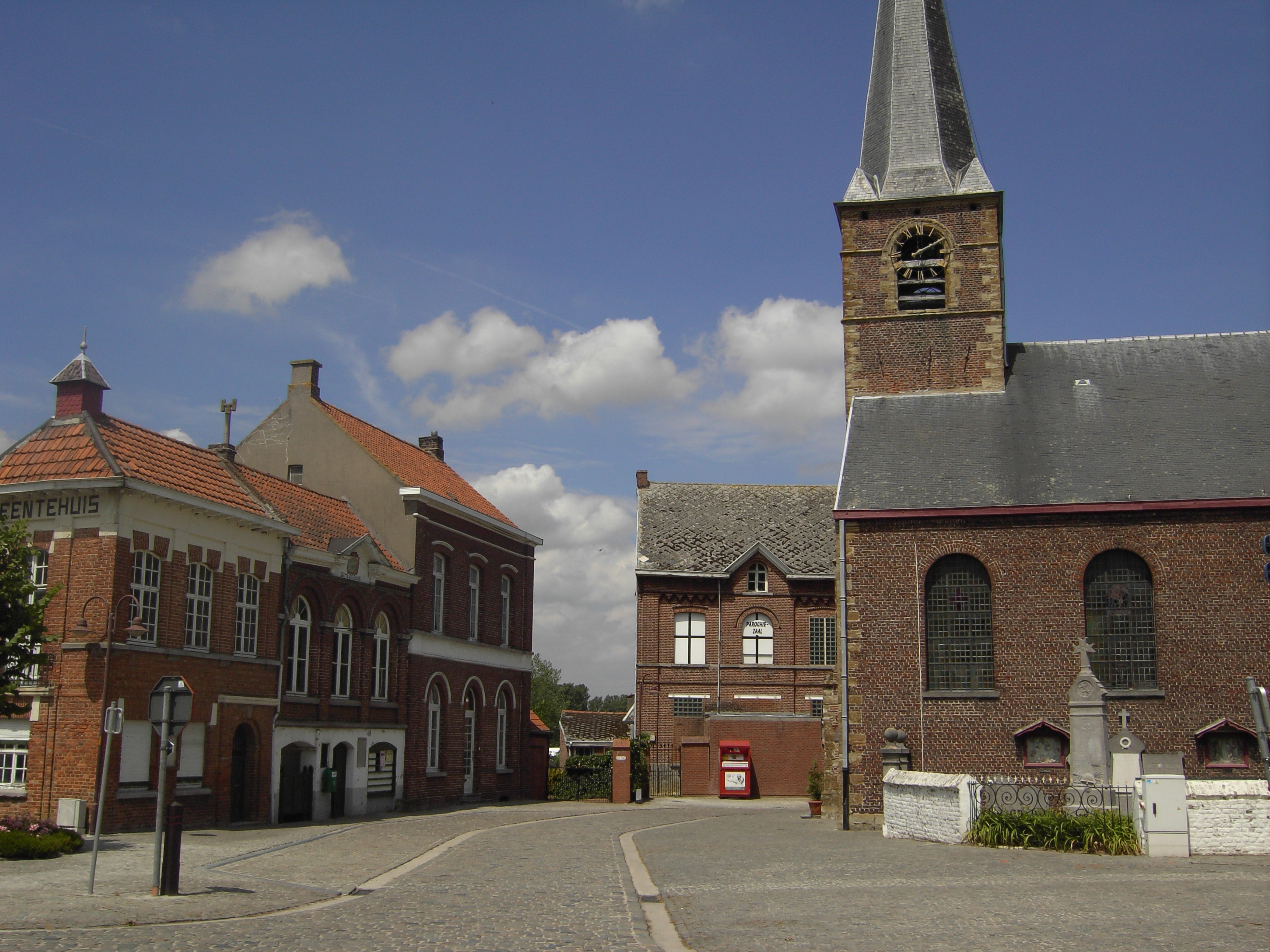 Grimminge: kerk, parochiezaal en gemeentehuis